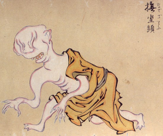 Nadezatō (撫坐頭) from the Hyakki Yagyō Emaki (百鬼夜行絵巻)